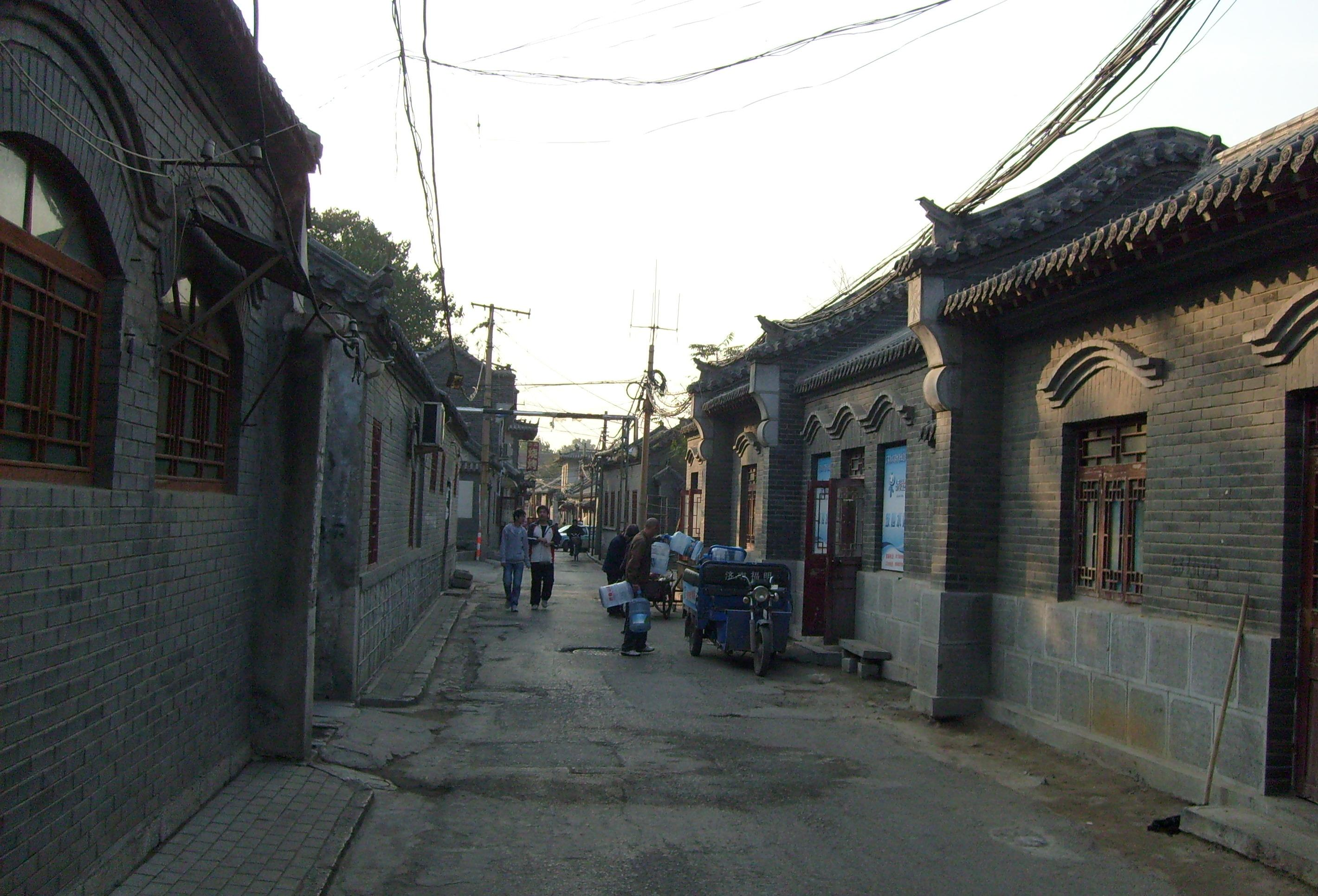 济南后宰门街